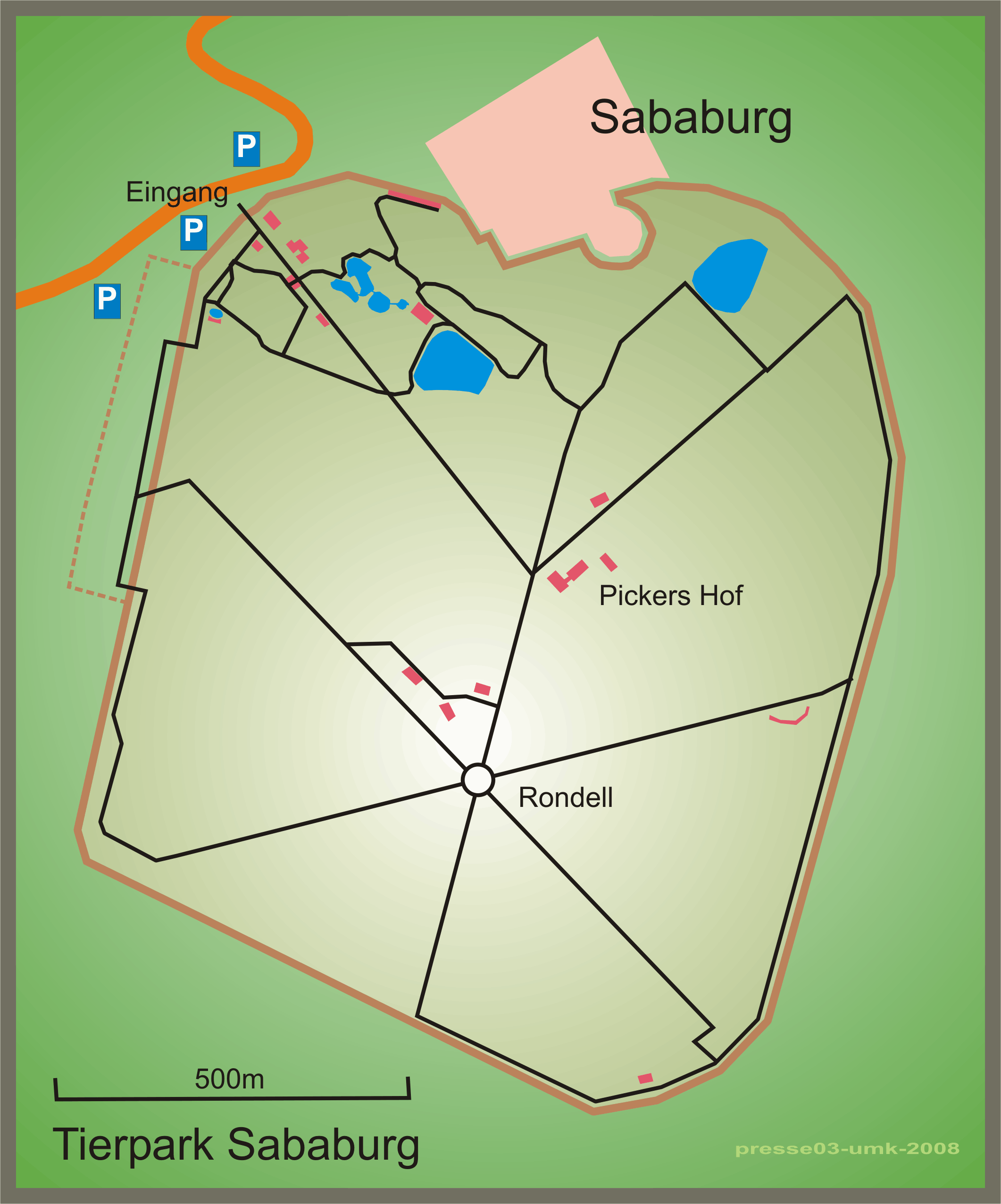 Tierpark Sababurg (Reinhardswald, Hessen) - Lageplan